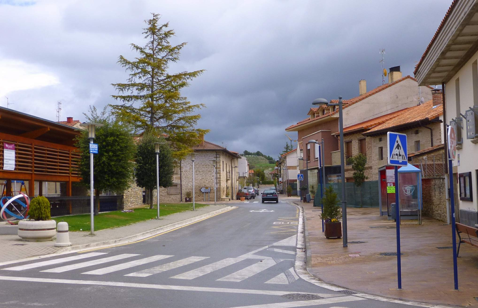 Rivabellosa (Álava)